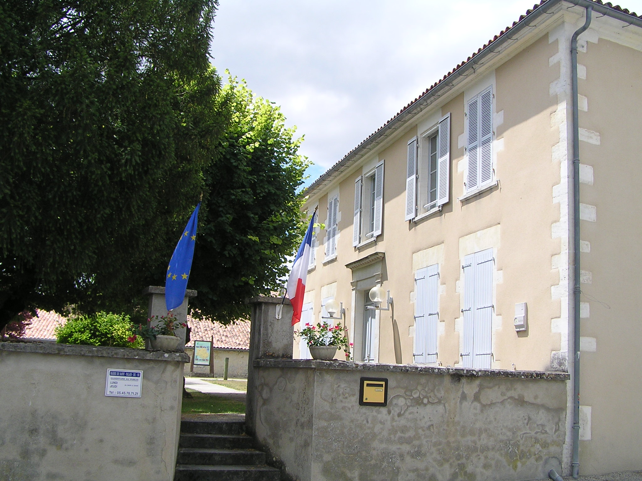 mairie de Saint-Palais-du-Né